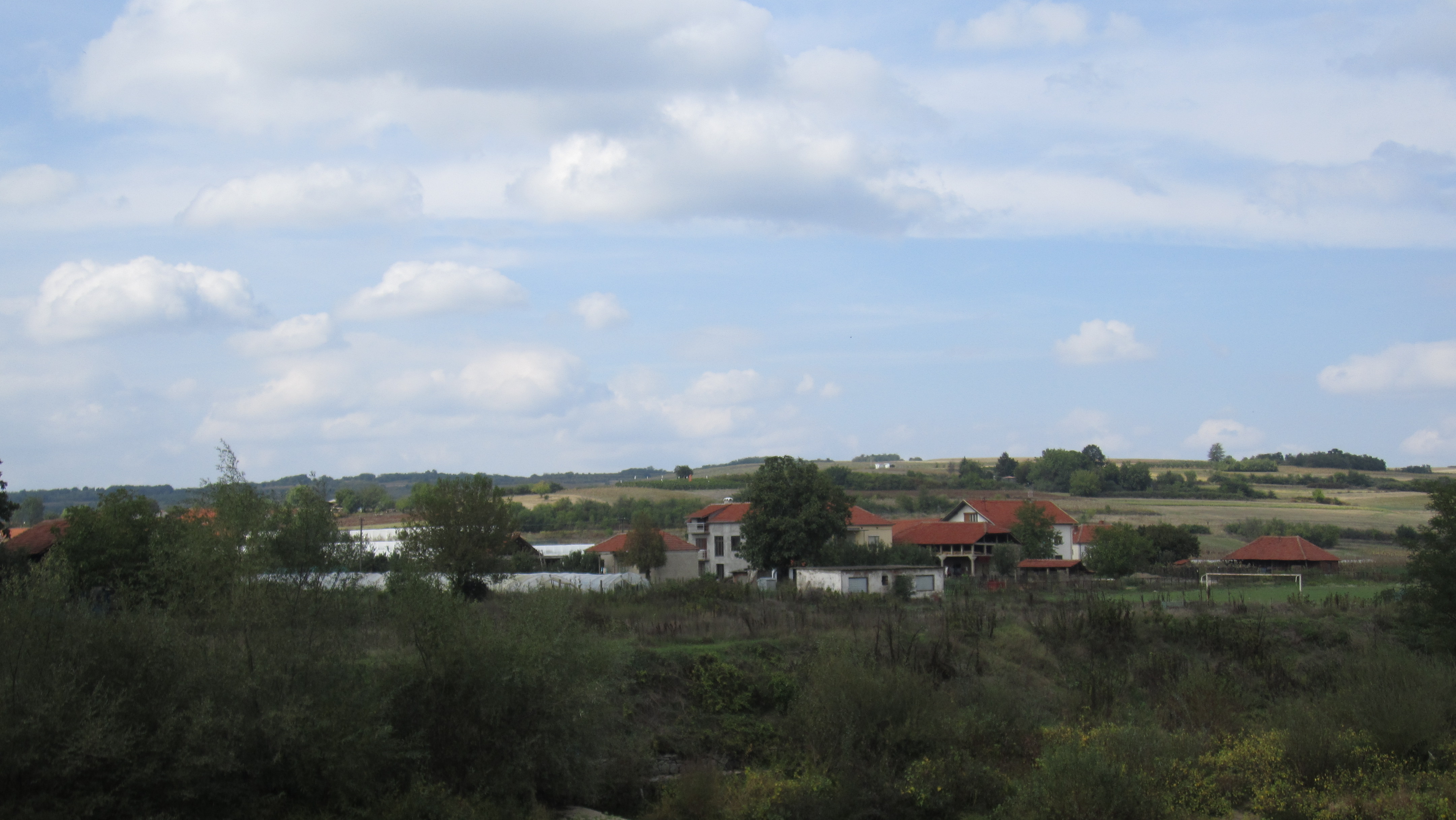 Srpski (latinica): Živkovo, Leskovac